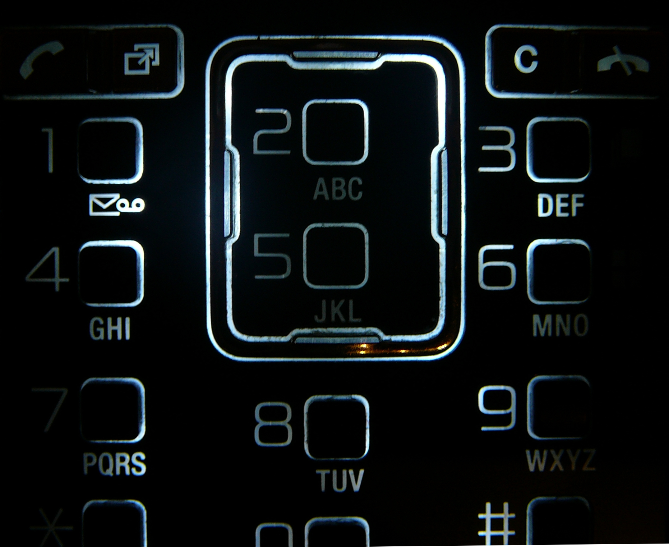 sony ericsson k850i navigácis billentyűk